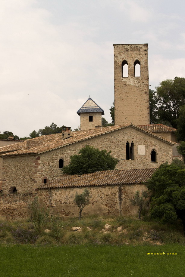 Església de Sant Esteve de Palaudàries - Lliçà d'Amunt (Vallès Oriental-Catalunya), 1059.